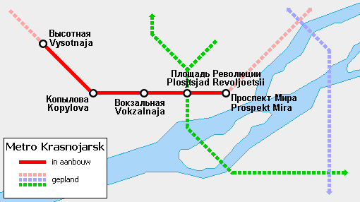 Kaart van de metro van Krasnojarsk